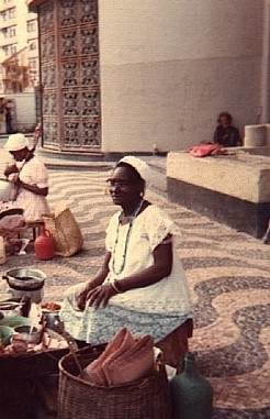 Baiana do acarajé, Salvador, Bahia, Brasil.